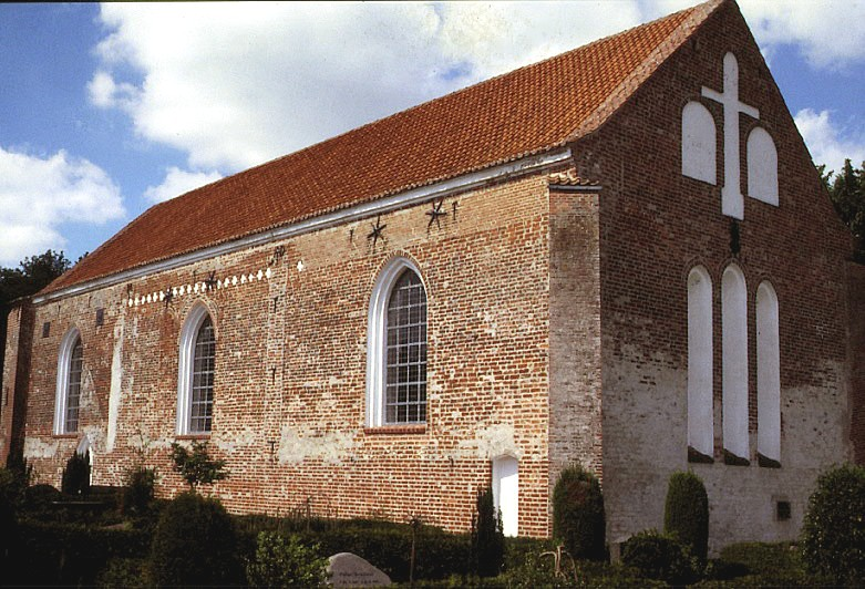 Skibet set fra sydøst da: Tvilum Kirke